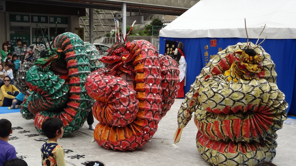 石見神楽・演目は大蛇(おろち)。周布青少年保存会（島根県浜田市）